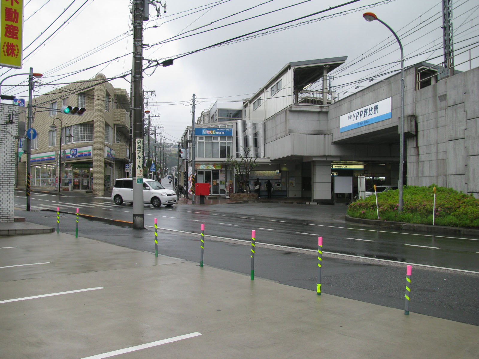 京浜急行久里浜線YRP野比駅